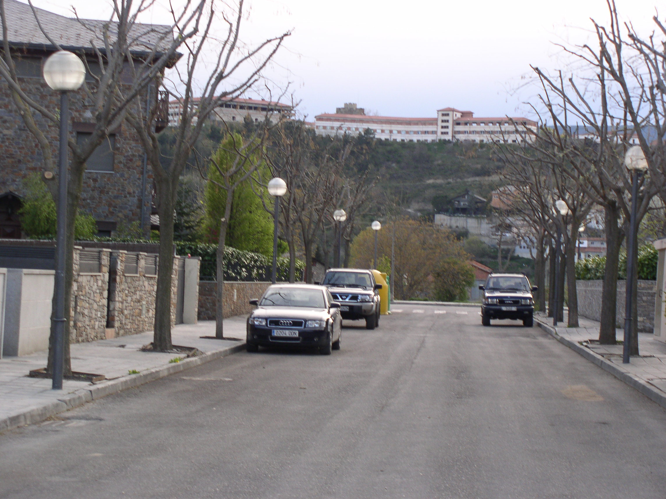 Ciutadella de Castellciutat vista des de la Seu d'Urgell